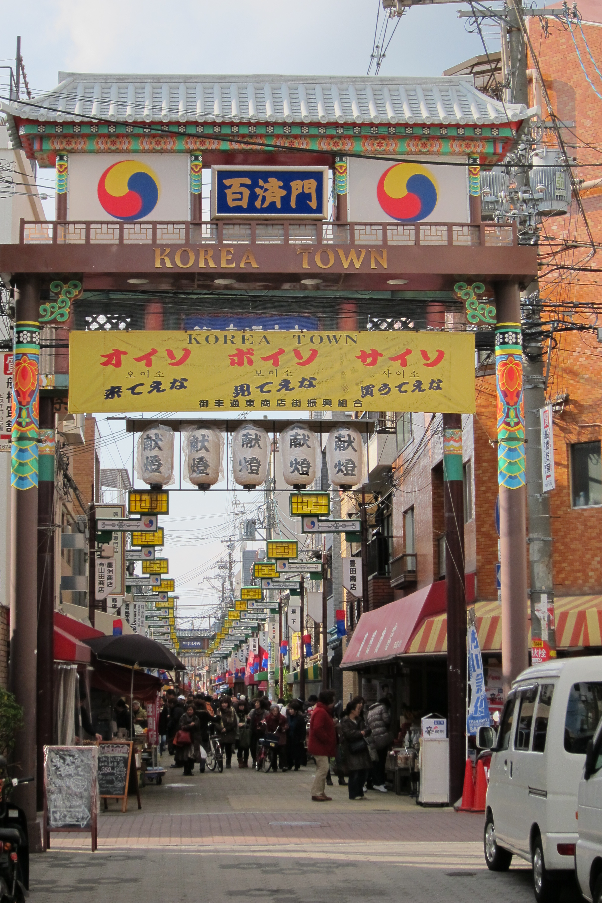 Ikuno Korea Town (御幸通中央商店街) at Osaka City, Japan.